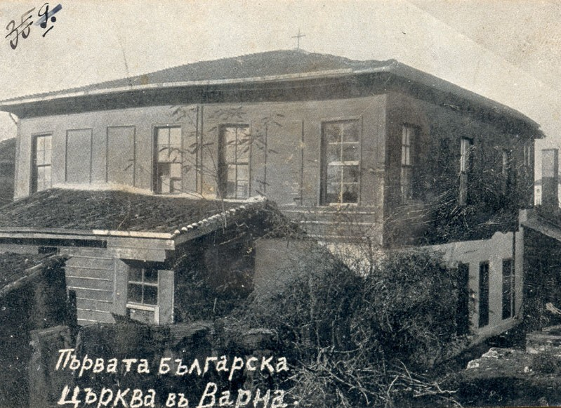 Първата българска църква във Варна. Общ изглед на сградата, откъм входа за църквата.